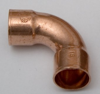 Kupferfitting Typ 5002: Bogen 90° i/i